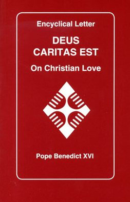 скан с обложки английского издания энциклики бенедикта xvi deus caritas est